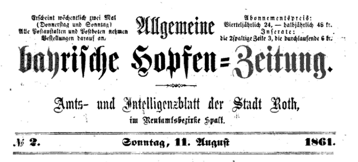 Titel der Allgmeinen bayerischen Hopfenzeitung 1861